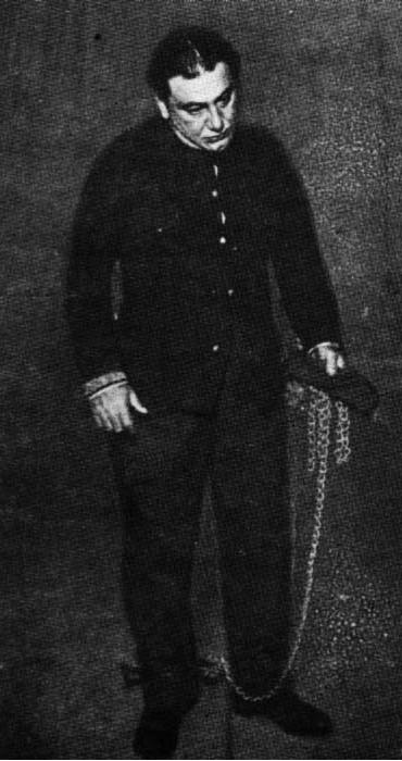 Actor uruguayo Pablo Podestá (1875-1923)